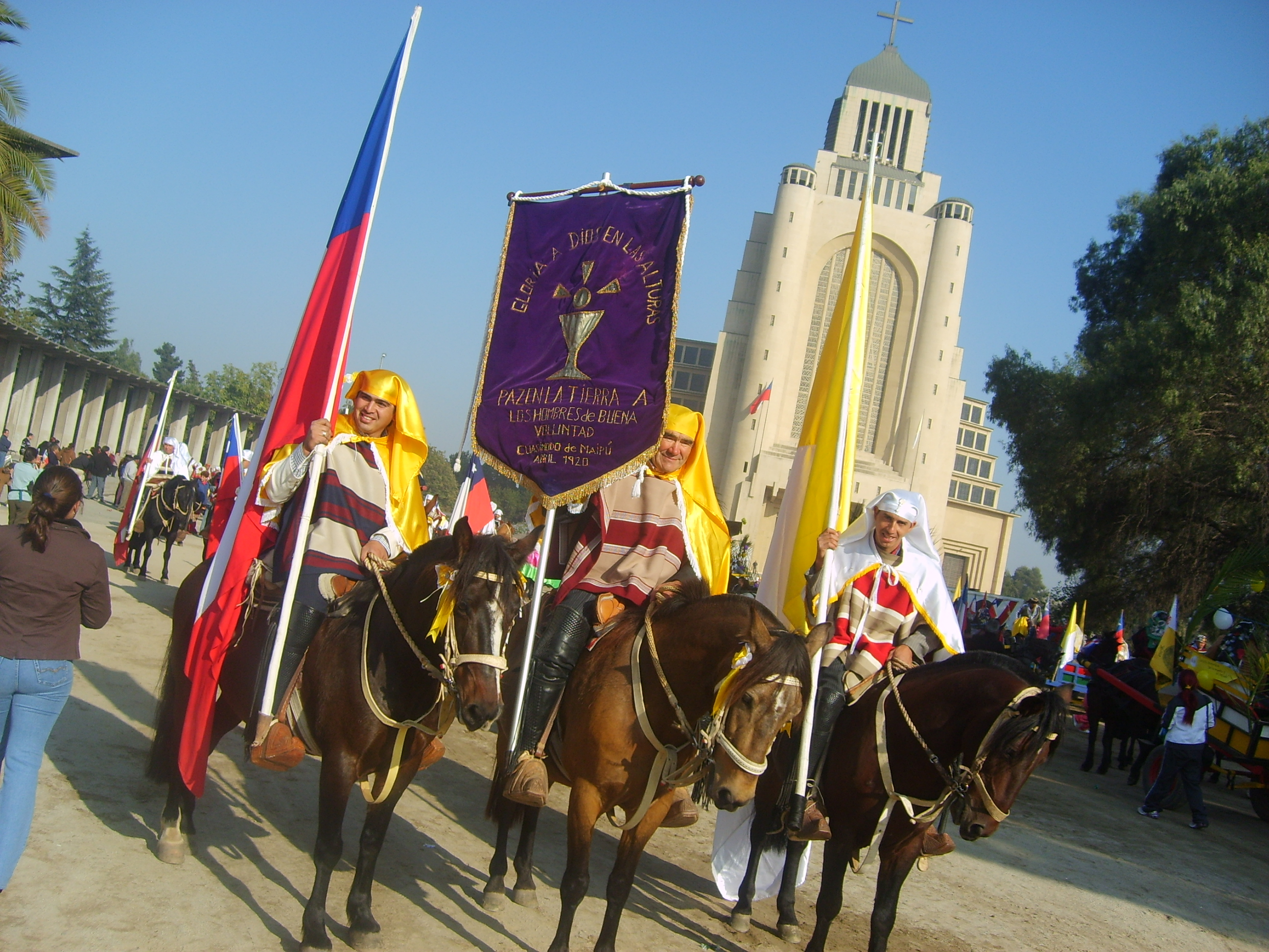 Fotografía obtenida por Valo durante la festividad de Cuasimodo el 13 de abril de 2007